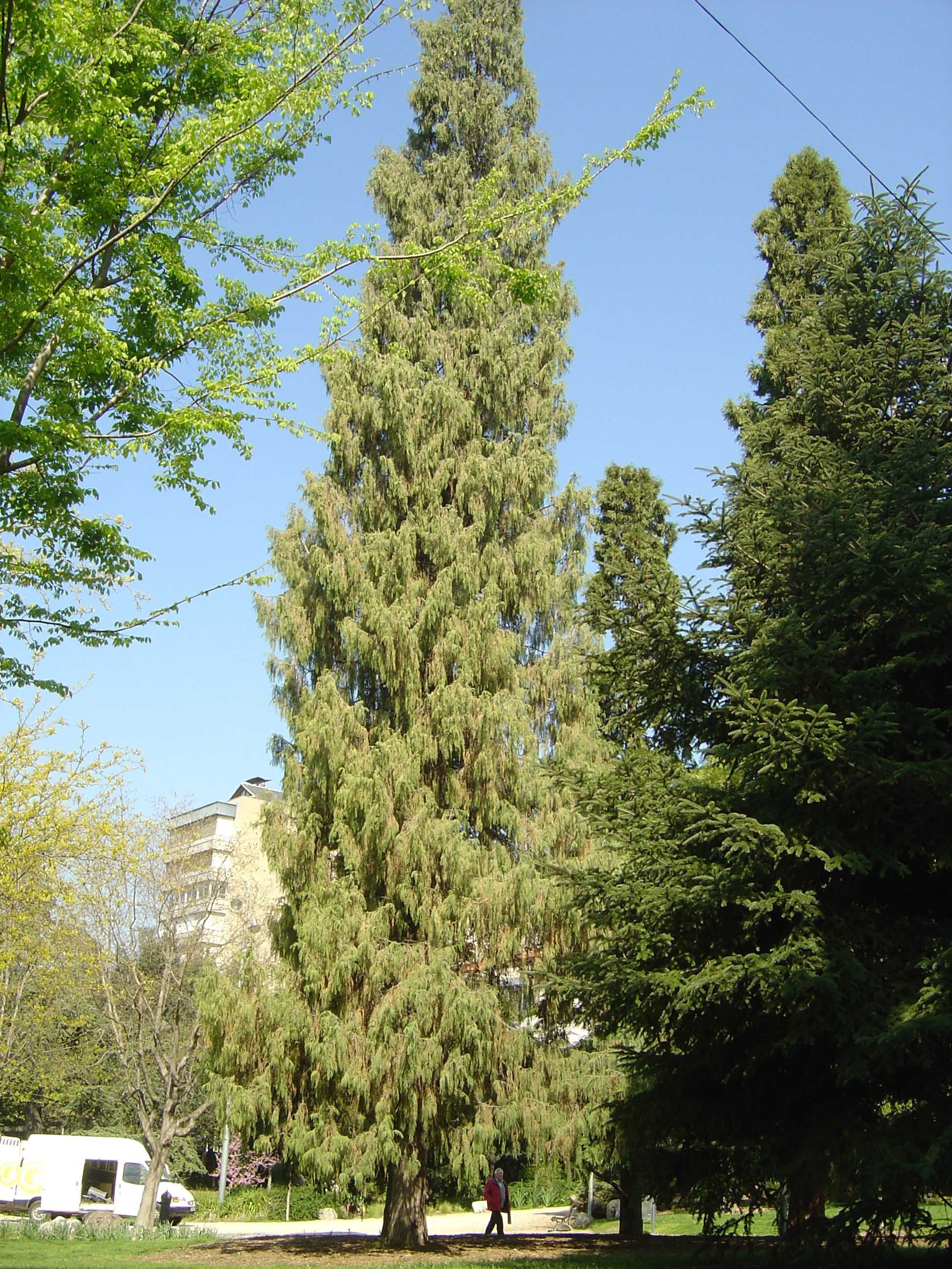 Xiprer del Caixmir (Cupressus cashmeriana) del parc Torras i Villà de Granollers. Arbre catalogat.